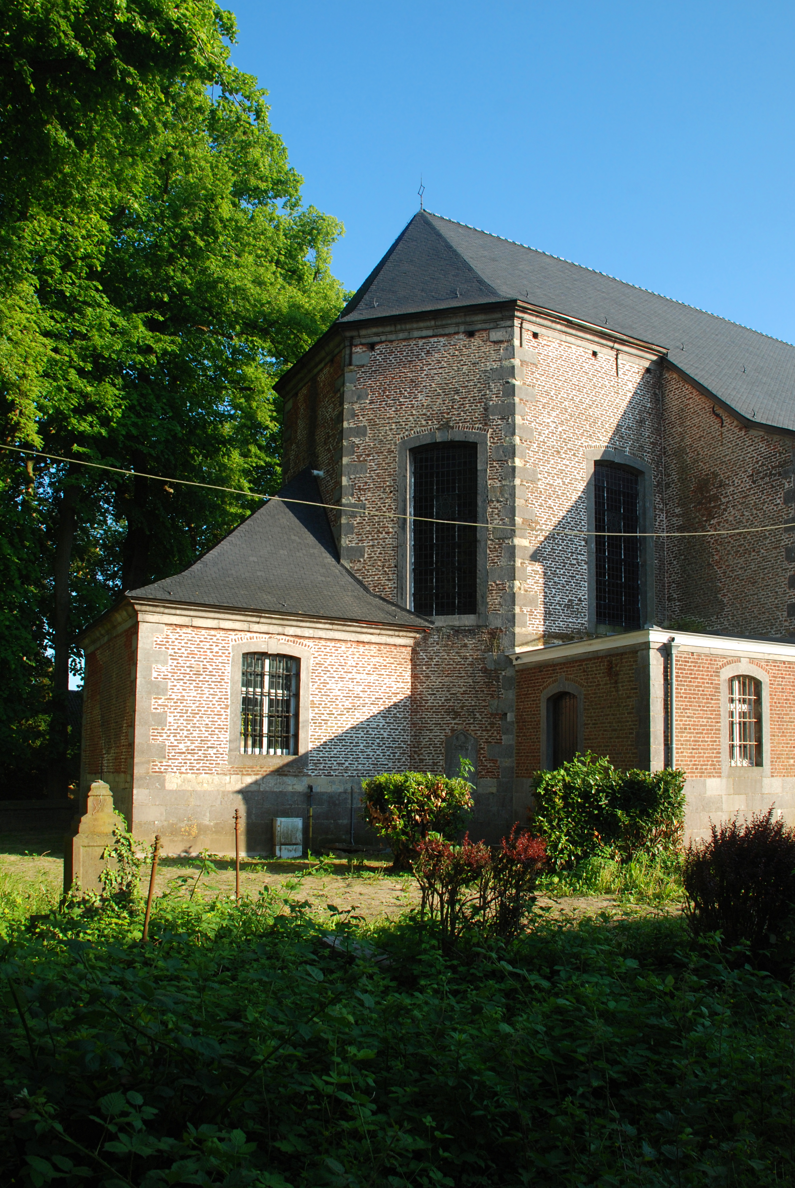 Belgique - Brabant wallon - Église de Court-Saint-Étienne